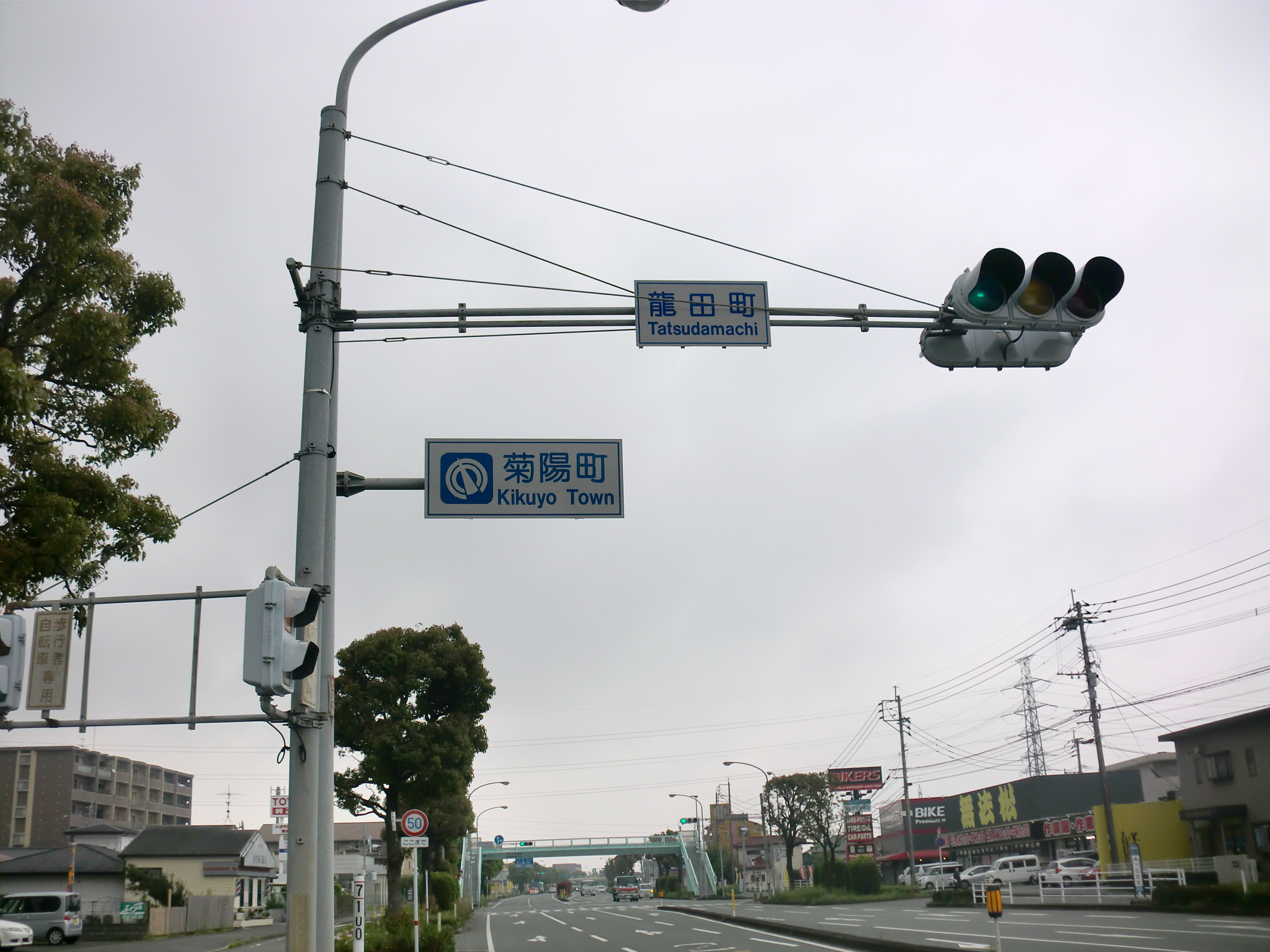 国道57号線にある熊本市と菊池郡菊陽町の境界